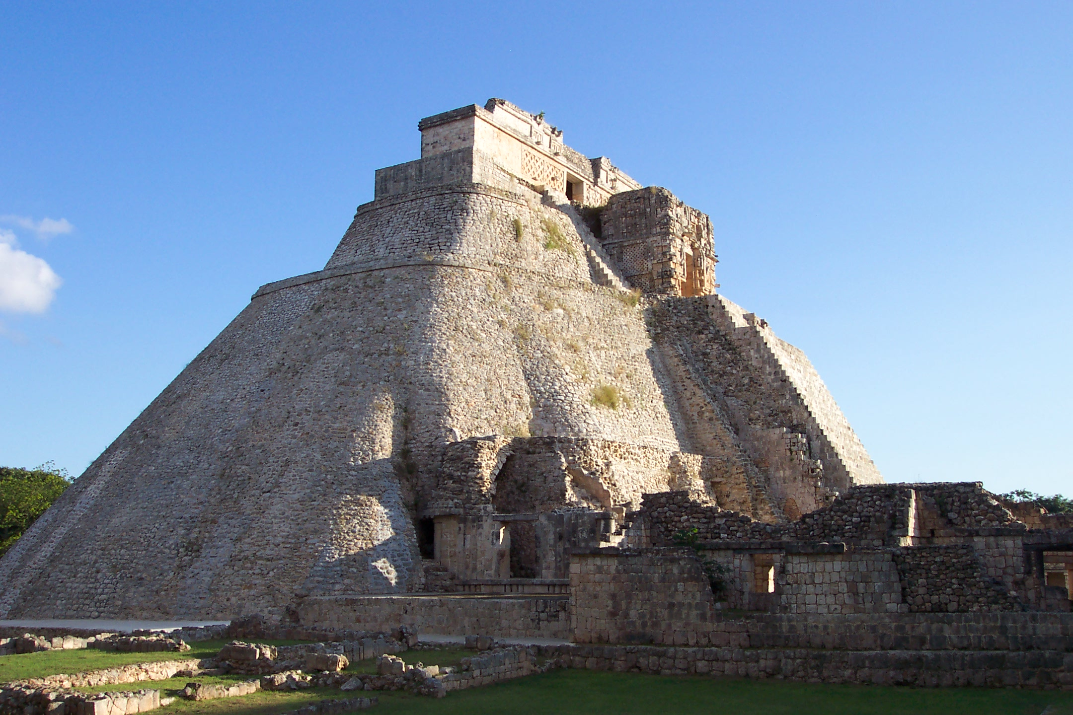 Magicians Temple - Uxmal